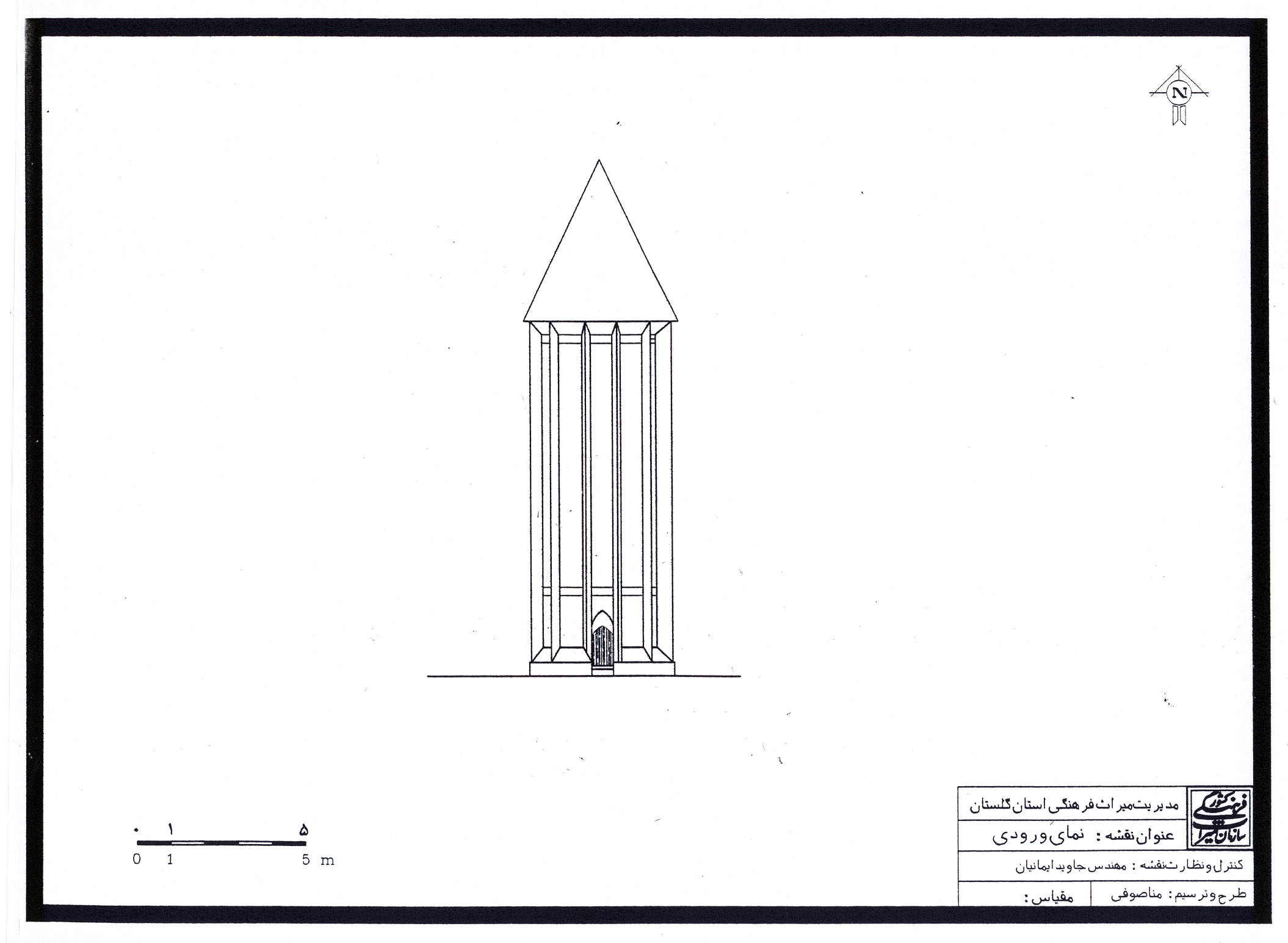 پلان برج قابوس